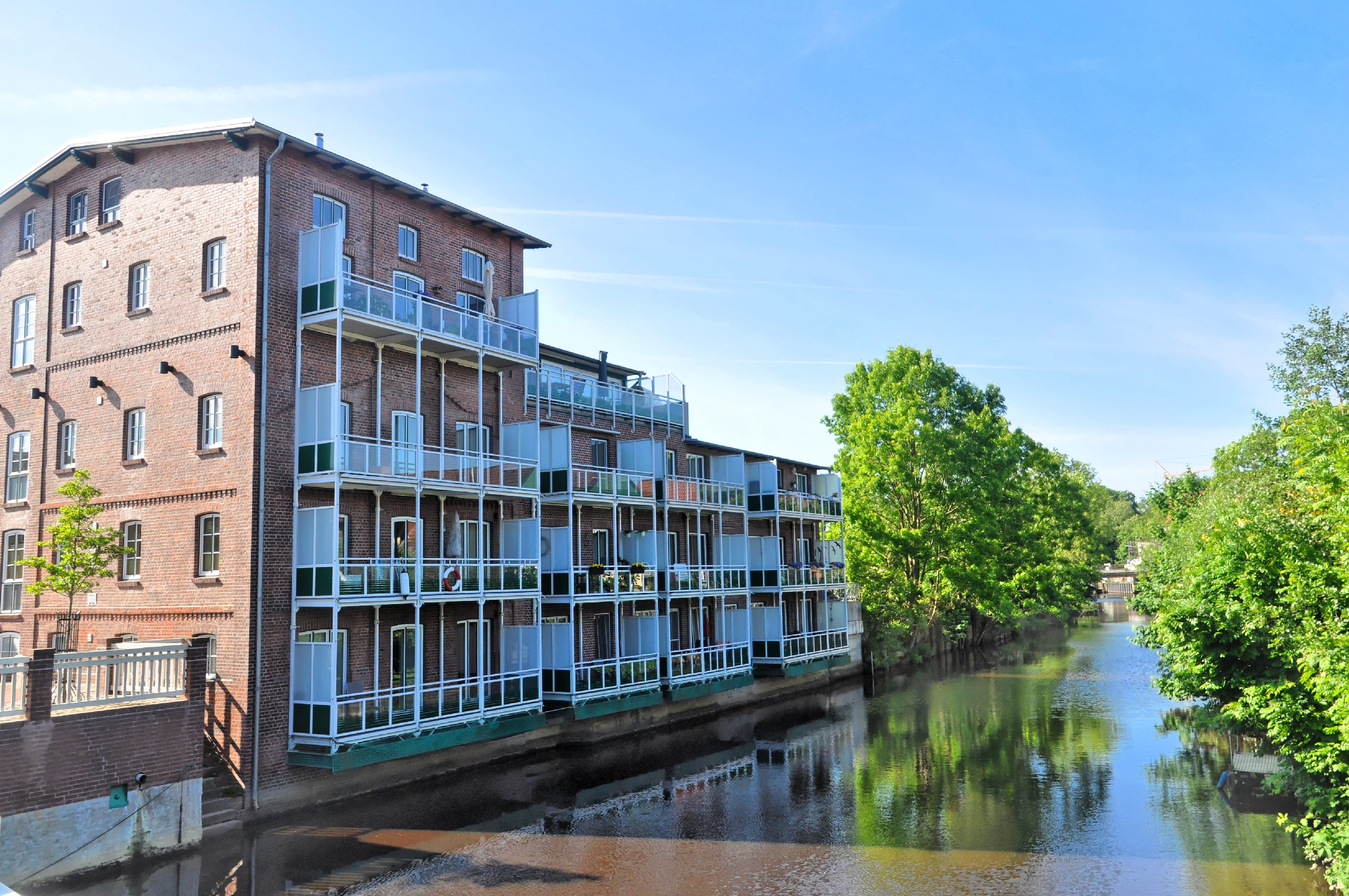 Bilder von der Medemfahrt 2014